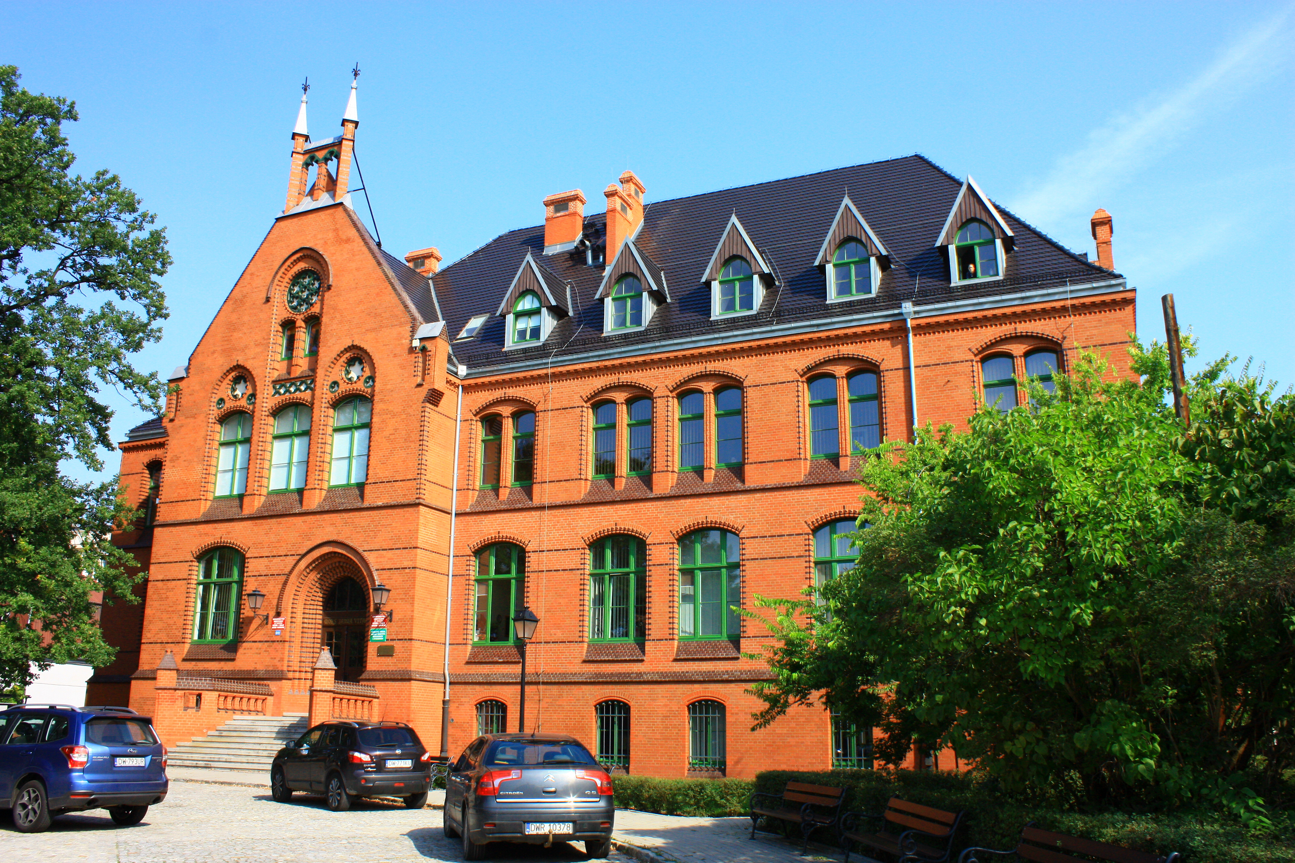 Wrocław, collegium Anatomicum